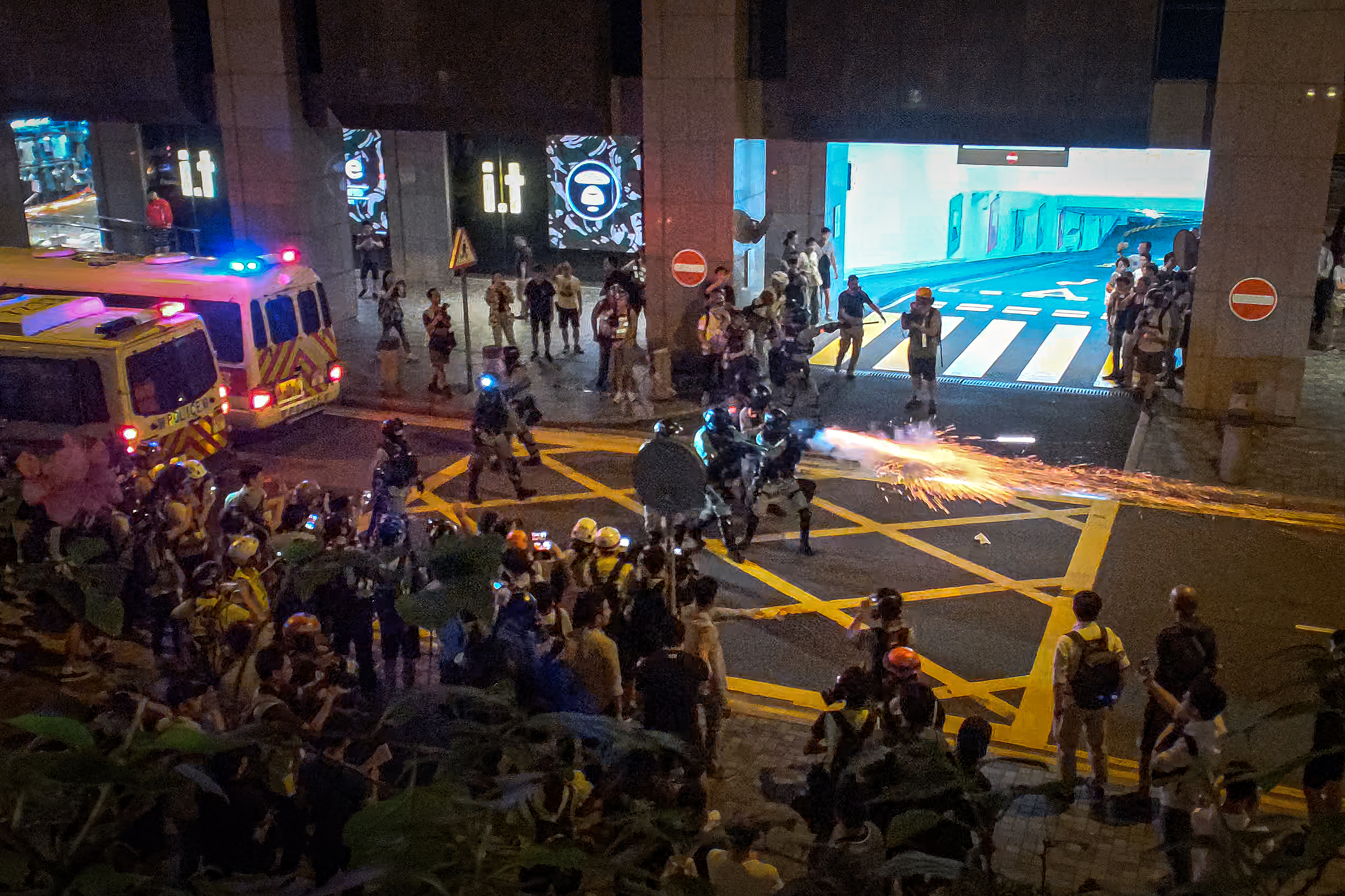 VID_20191103_220937.00_00_17_28.Still001-edit